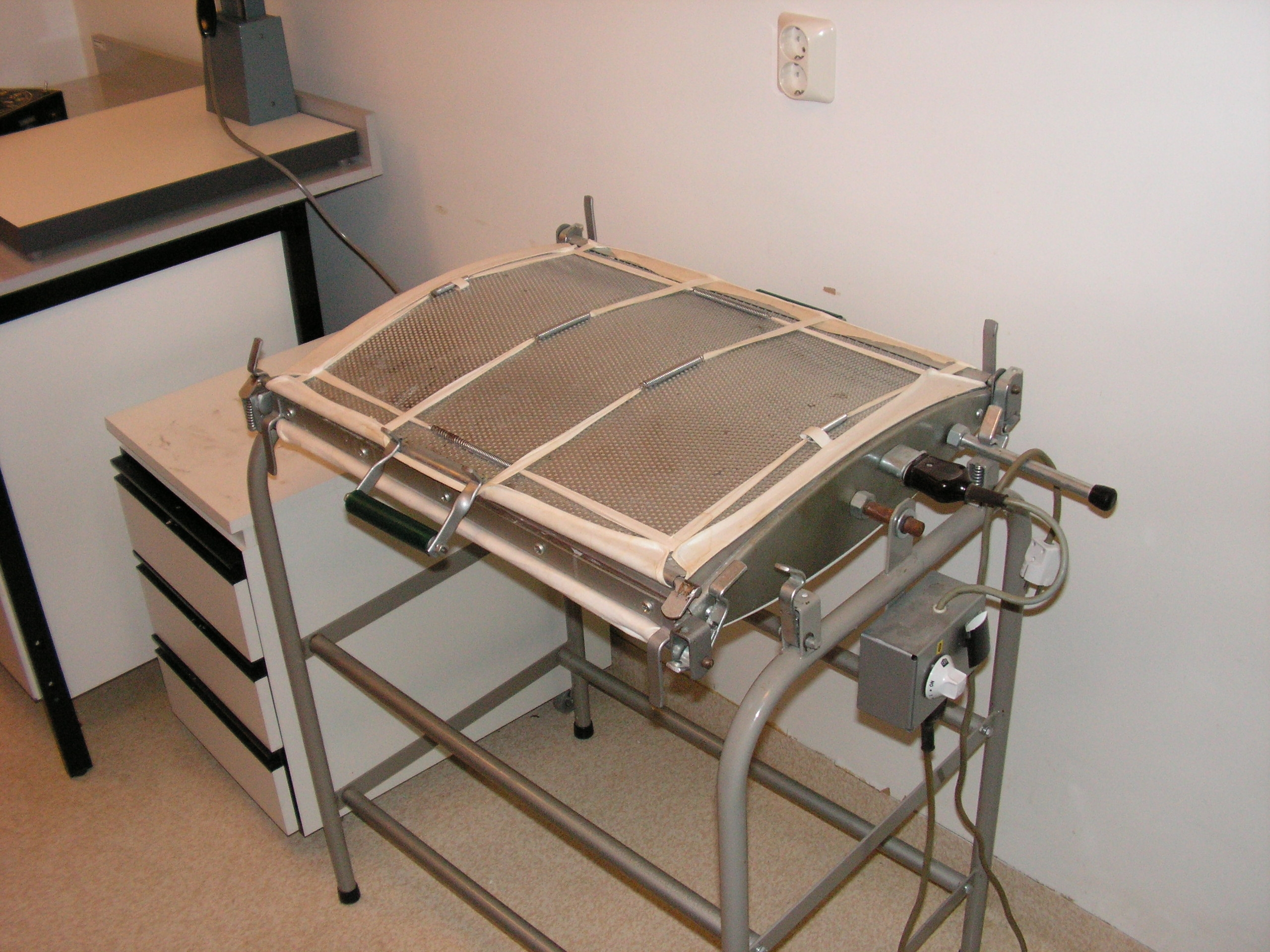 Foto Stefan Linder